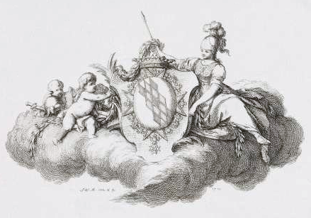 Bekröntes Wappen des preußischen Generals Johann Jobst Heinrich Wilhelm Freiherr von Buddenbrock (Taufnamen auch in der Reihenfolge Johann Wilhelm Heinrich Jobst), gehalten von Minerva und zwei Putti, die es mit Lorbeer schmücken. Um das Stammwappen Buddenbrock die Collane mit dem Kreuz des Schwarzen Adlerordens, dessen Mitglied der Eigner war. Radierung.